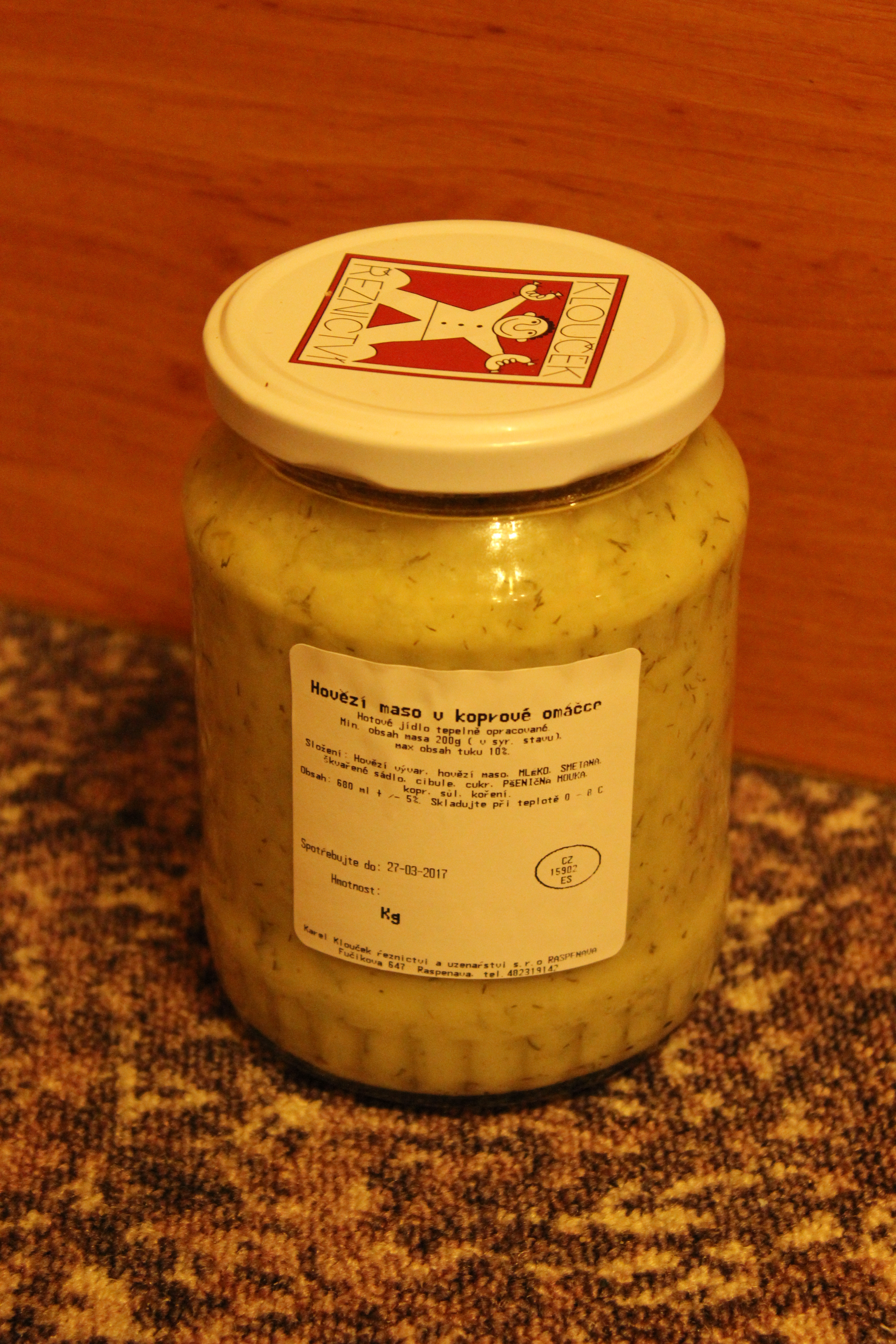 Sklenice koprové omáčky z produkce raspenavského řeznictví Klouček.